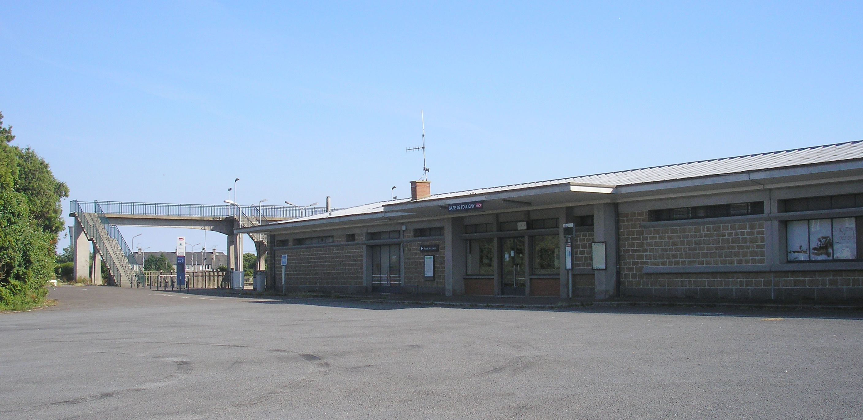 Folligny (Normandie, France). La gare.